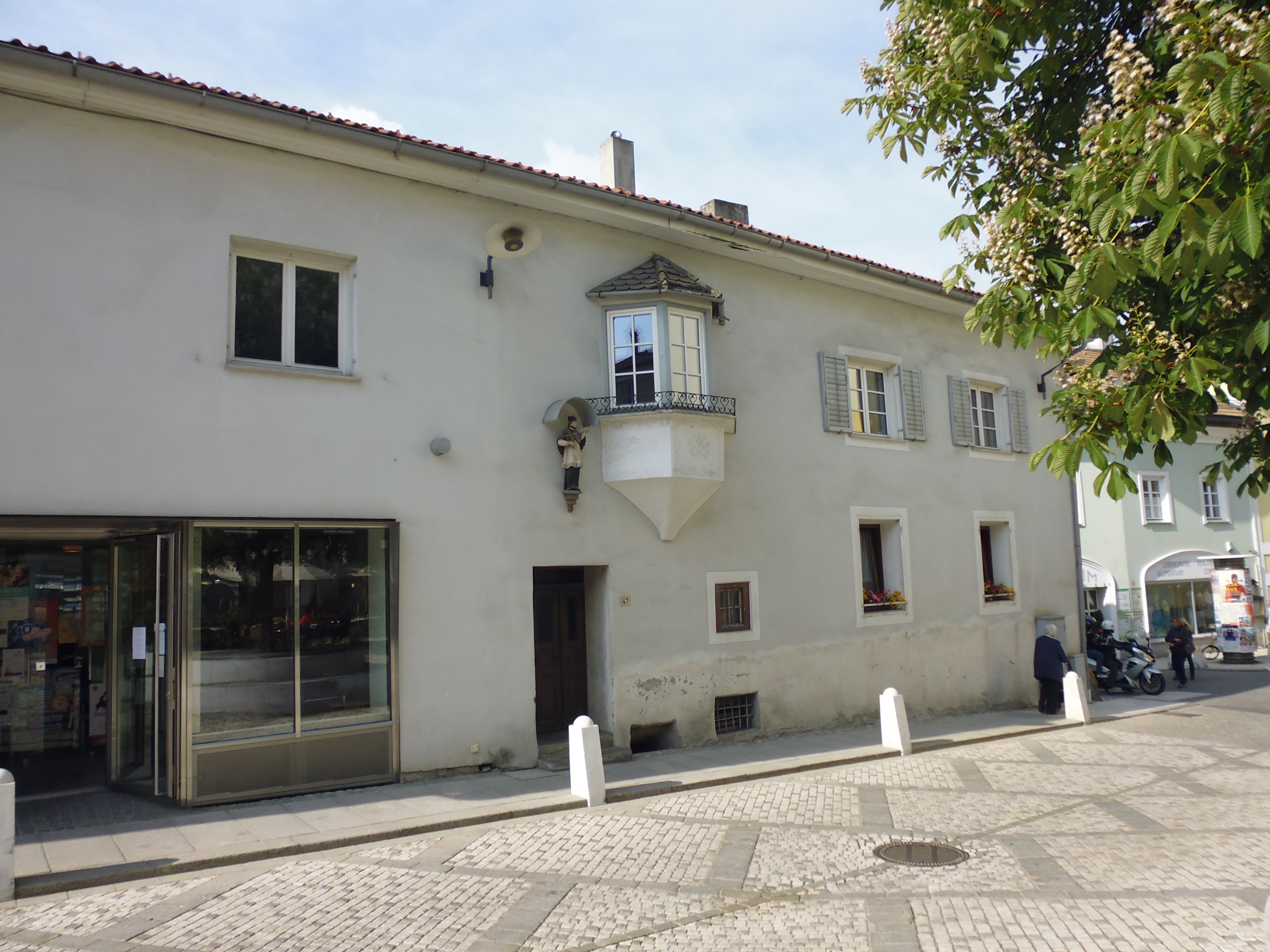 Das Gebäude Vinschgaustraße 47 in Laas (Südtirol). Es ist zusammen mit dem angebauten Haus Schneidergasse 5 ein geschütztes Baudenkmal.